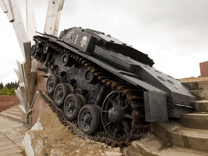 Штурмовое орудие StuG III Ausf. C und D в открытой экспозиции мемориала 11 героям-саперам (Волоколамск, Россия)